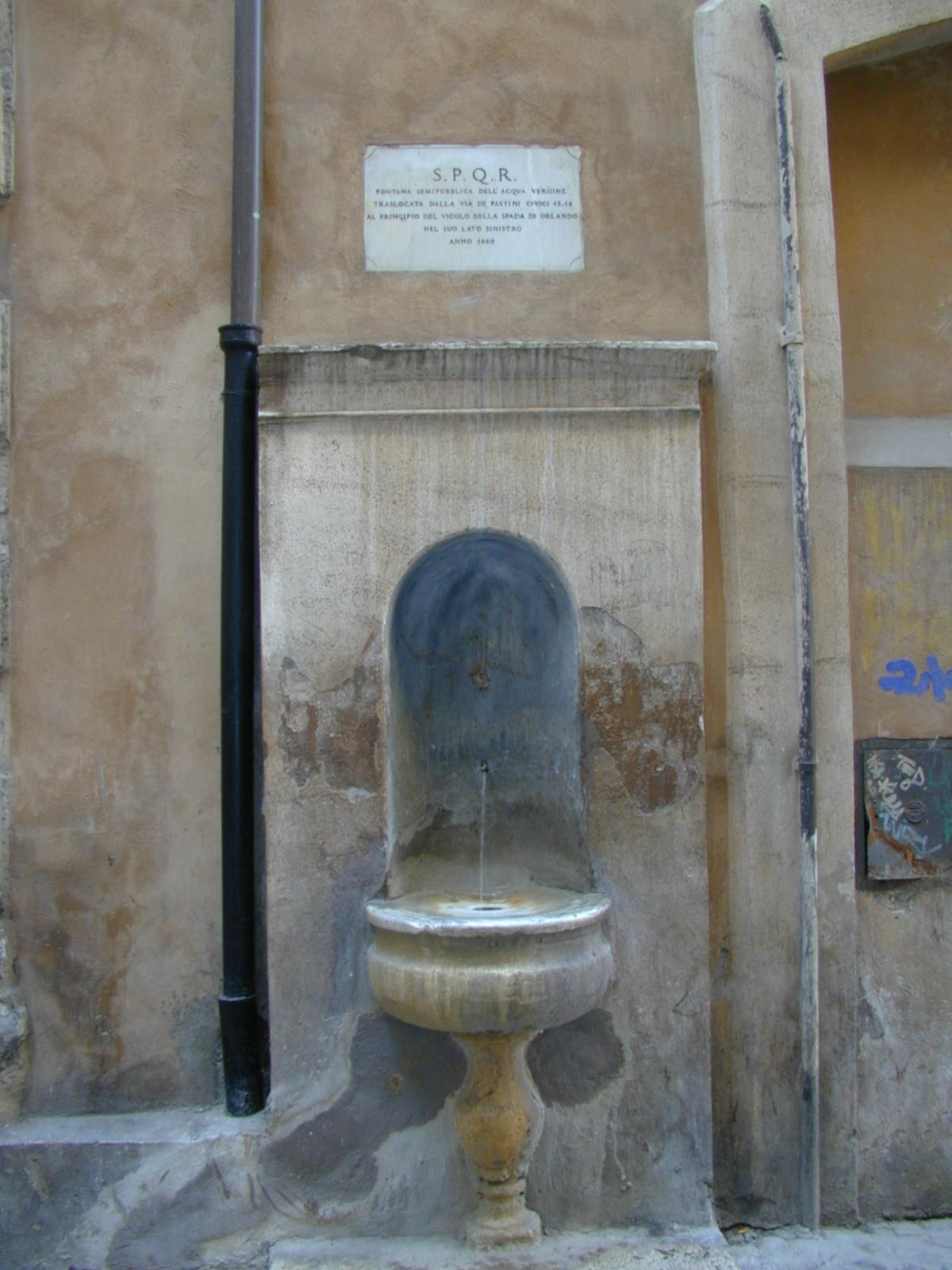 Roma, fontanella dell'Acqua vergine a vicolo della spada di Orlando by Lalupa